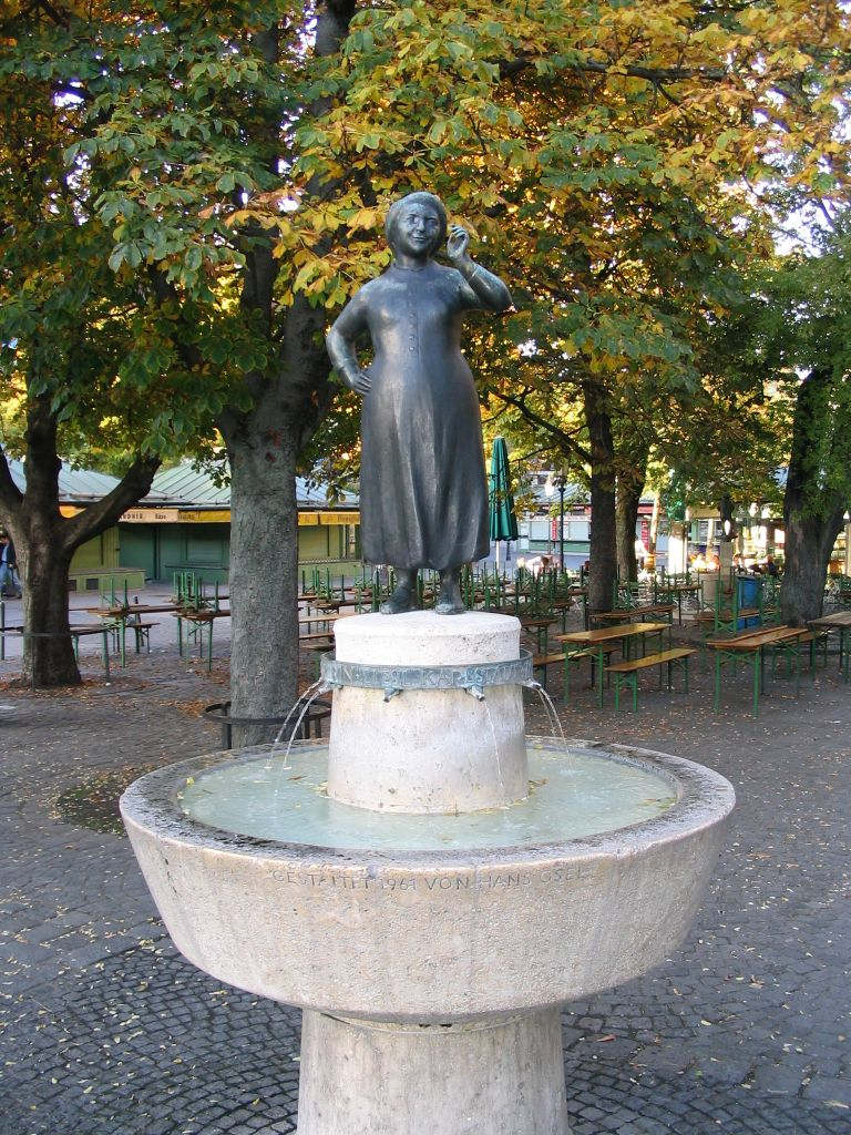 Liesl-Karlstadt-Brunnen vom Bildhauer Hans Osel (1961) auf dem Viktualienmarkt in München.